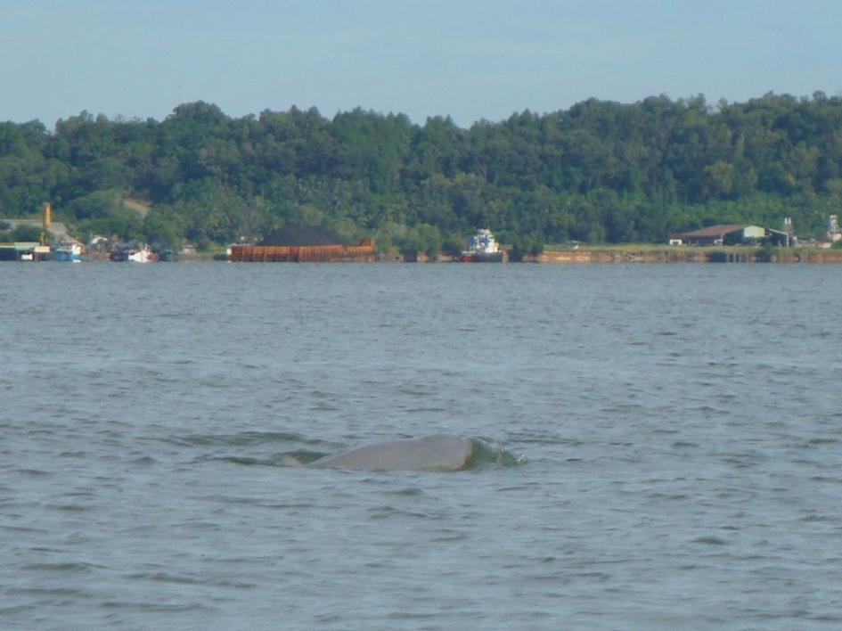 Pesut air Asin, yang saya abadikan di perairan Balikpapan, tepatnya di dekat Pantai Lango (Penajam Paser Utara), Kalimantan Timur